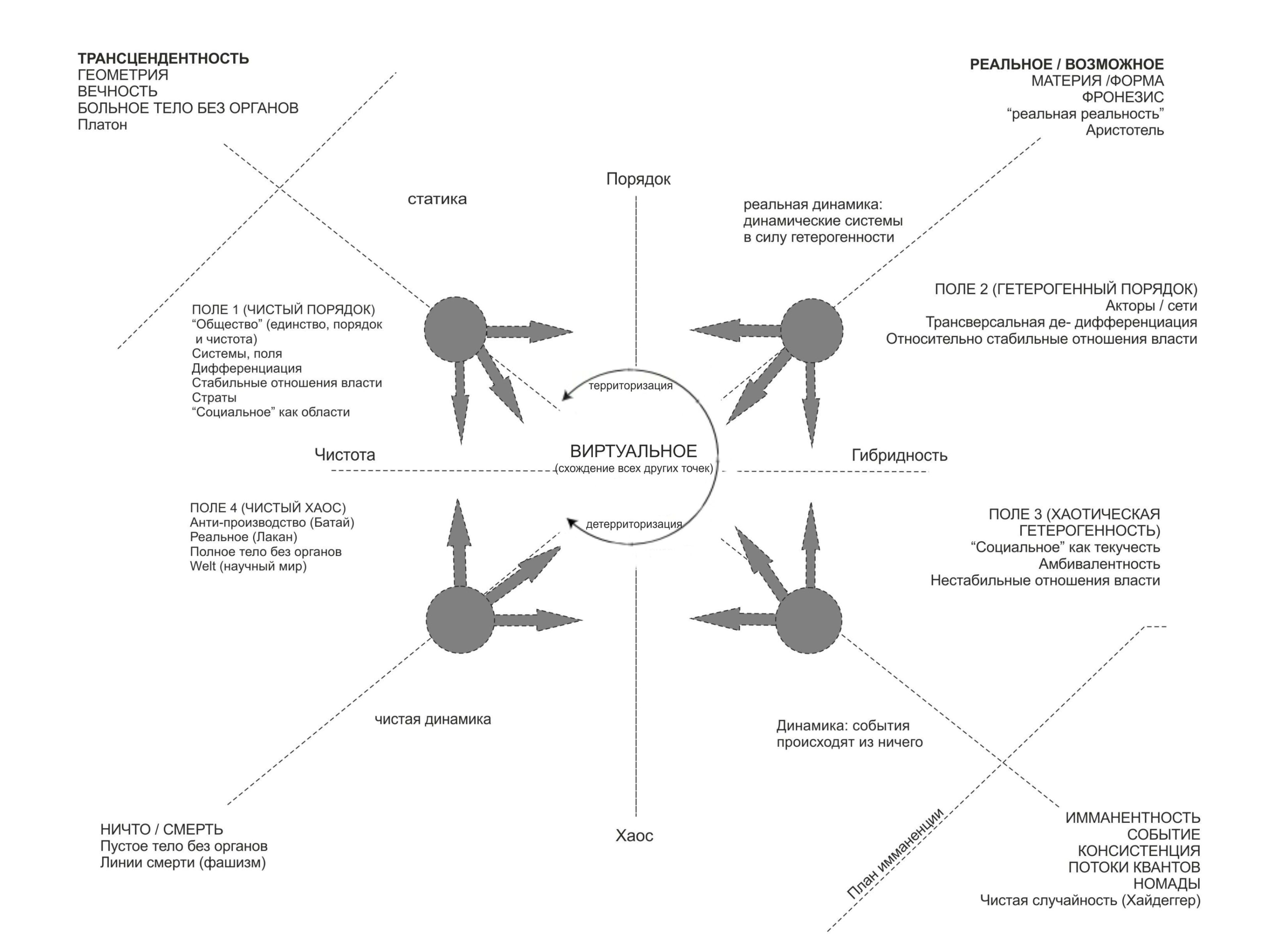 Реконструкция социального у Жиля Делёза